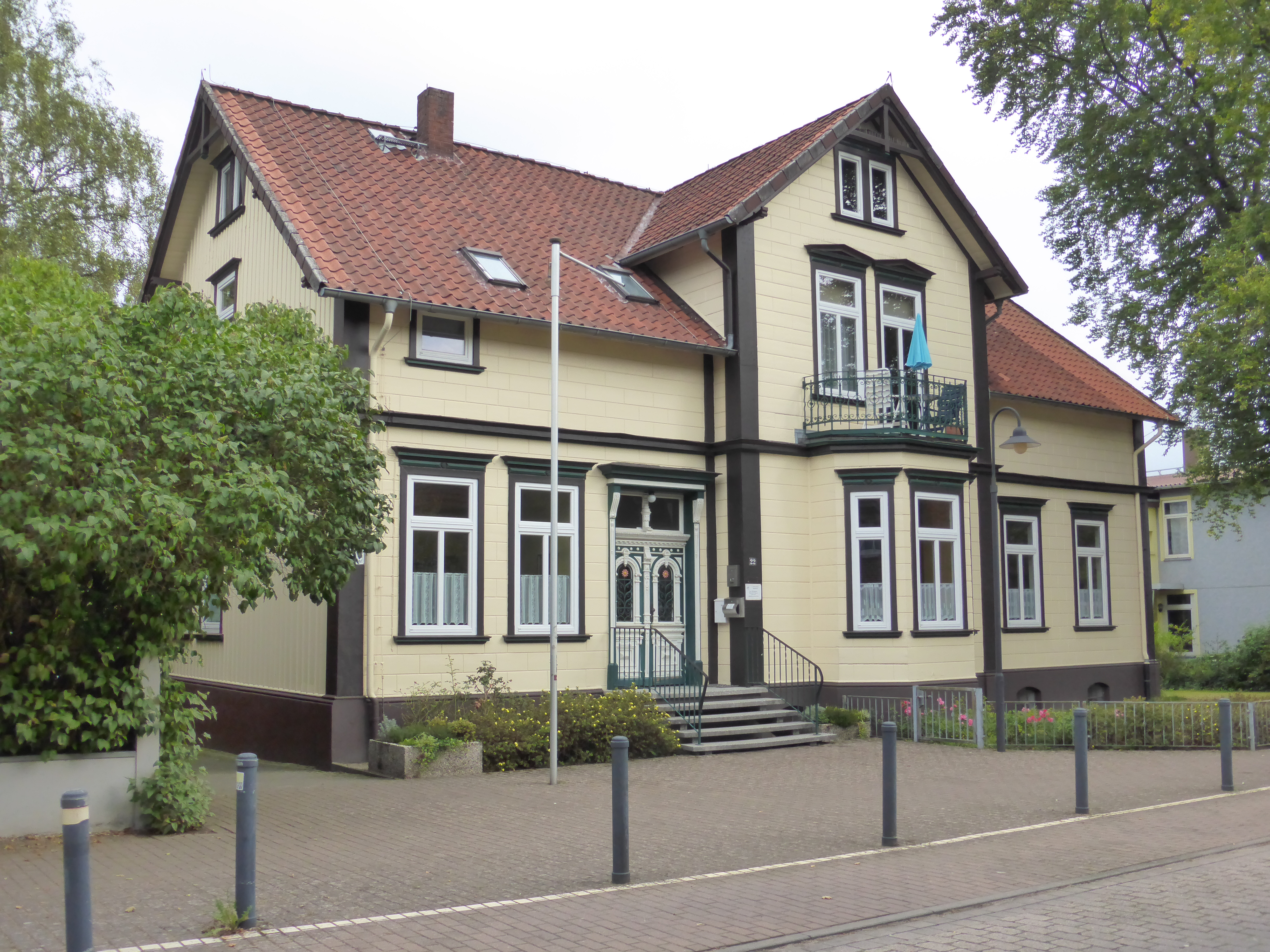 Pfarrhaus der Kirche Sankt Maria vom heiligen Rosenkranz zu Soltau, Feldstraße 22 in Soltau, Heidekreis, Niedersachsen